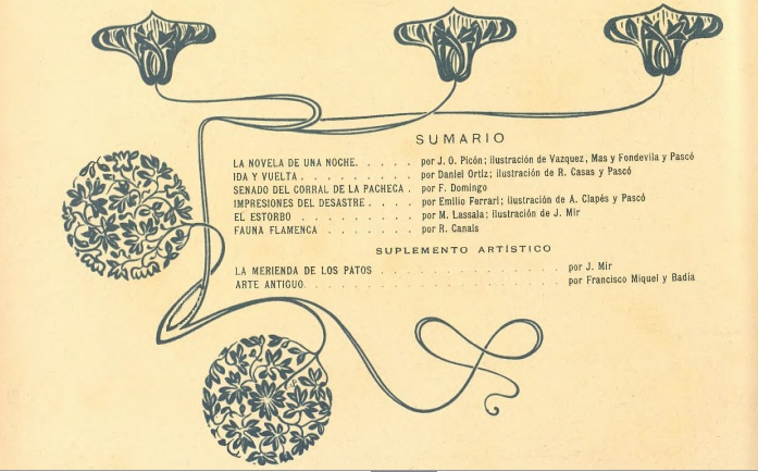 Sumario del segundo número de la revista modernista Hispania